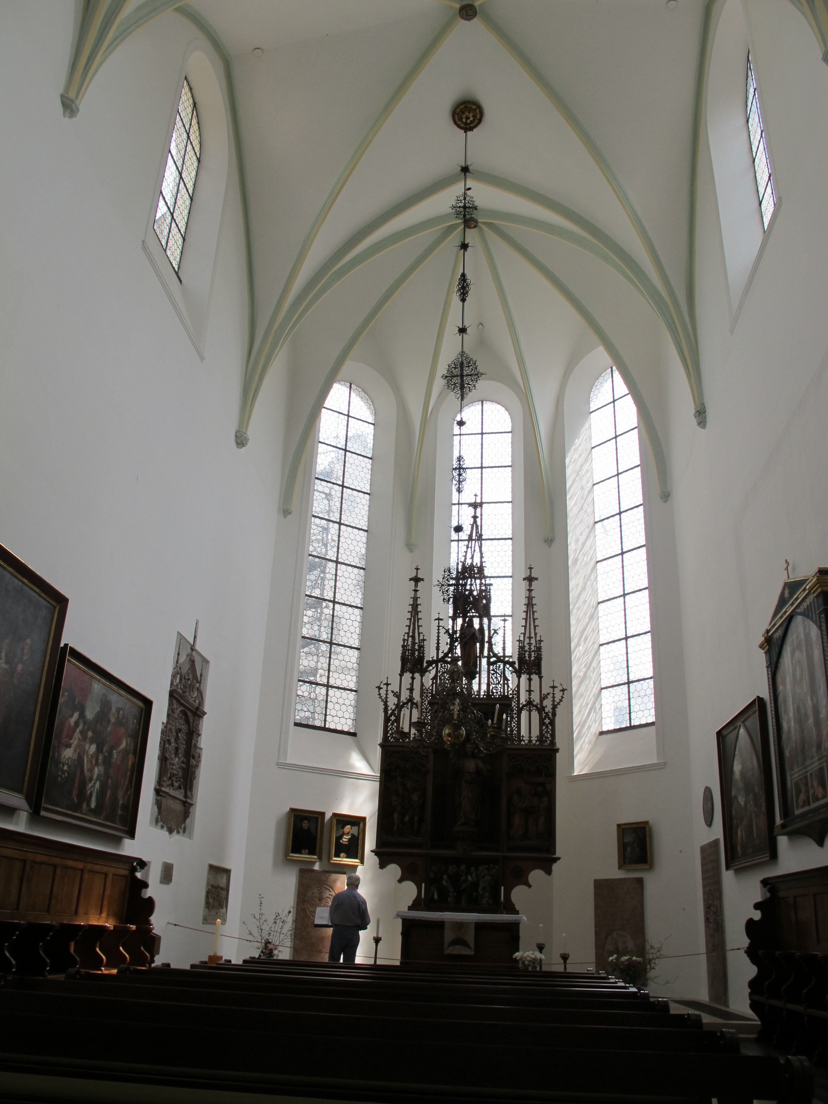 augusta augsburg